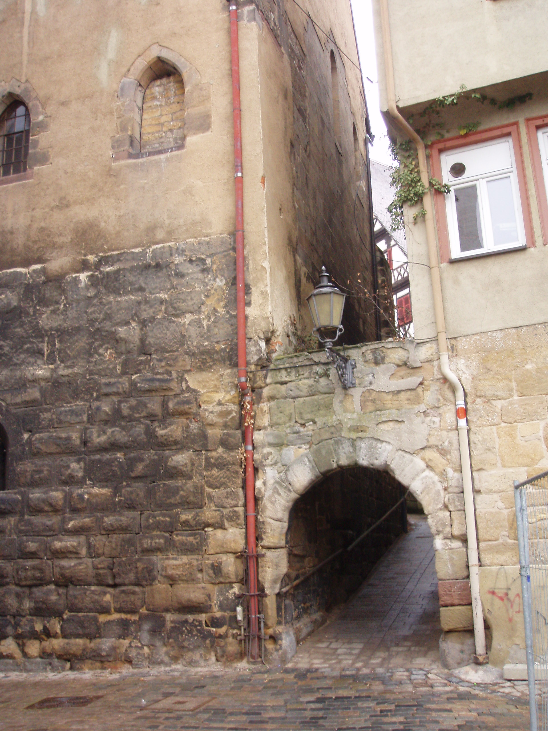 Rückseite des Stadtarchivs Esslingen